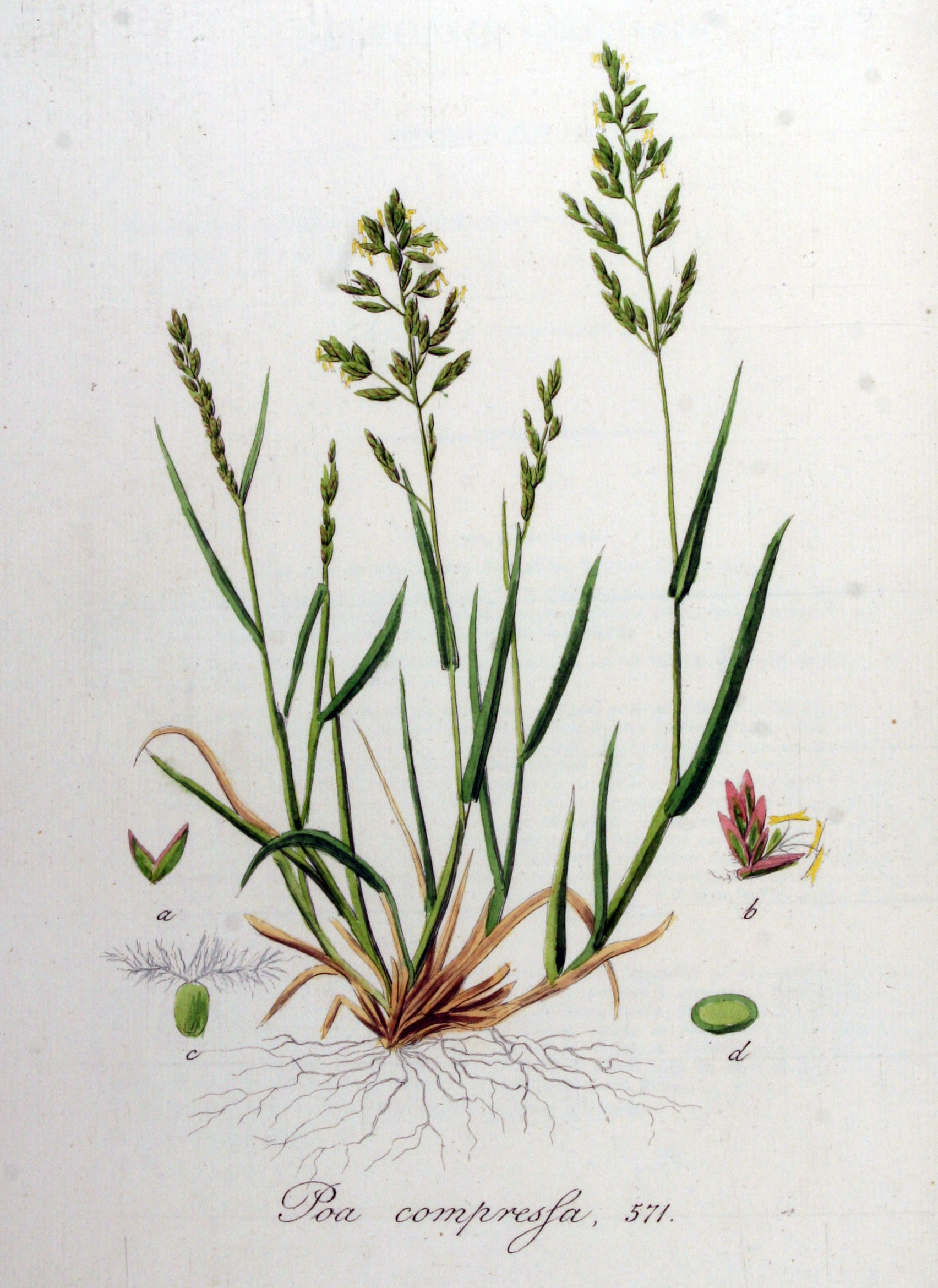 Poa compressa L.